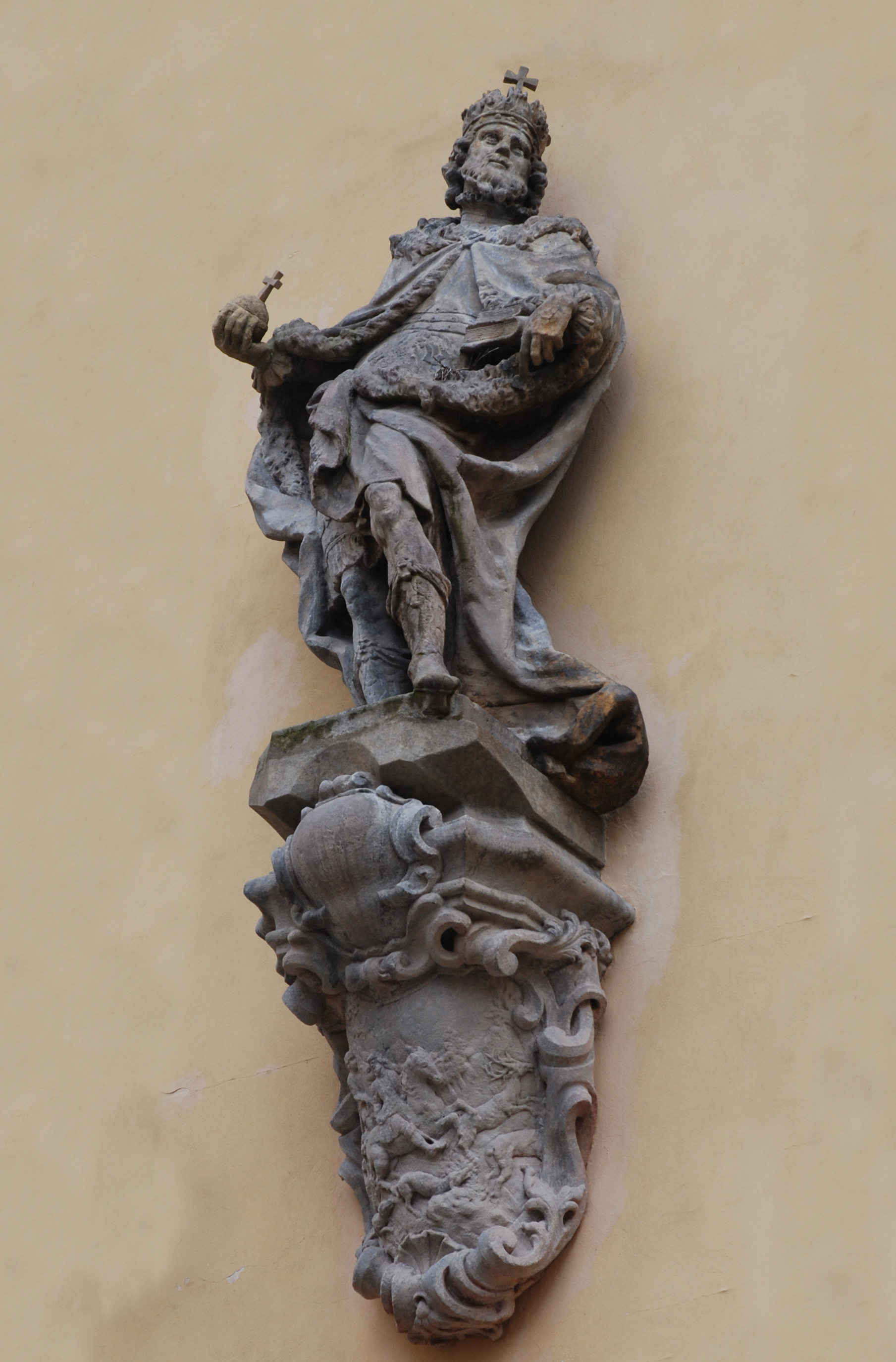 Socha Karla IV. na průčelí Městské knihovny v ulici I. P. Pavlova v Karlových Varech